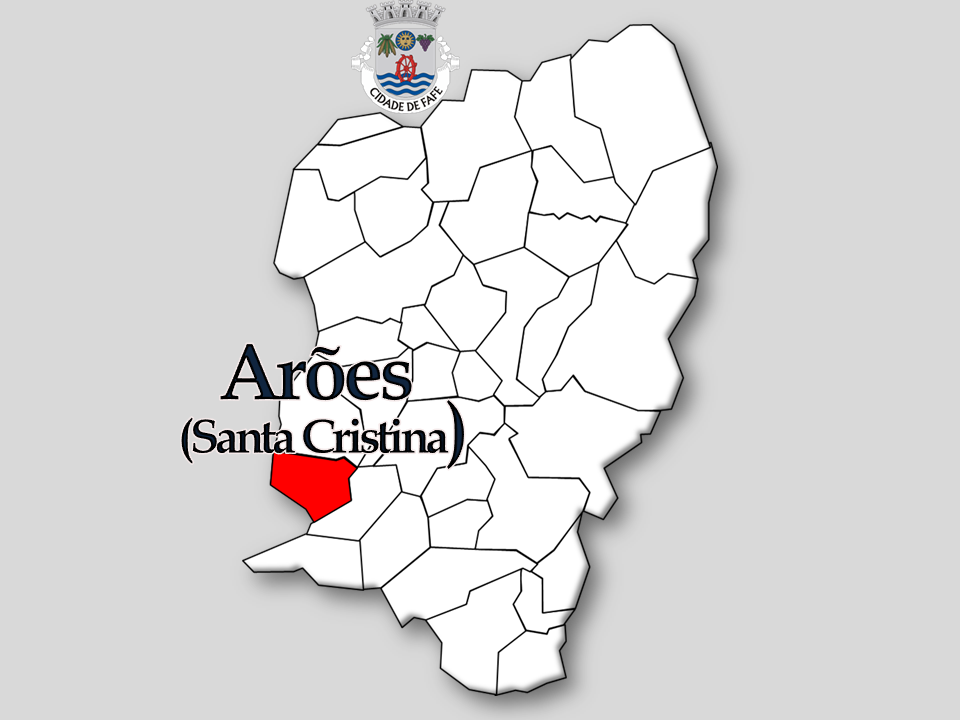 Censos 1864/2011